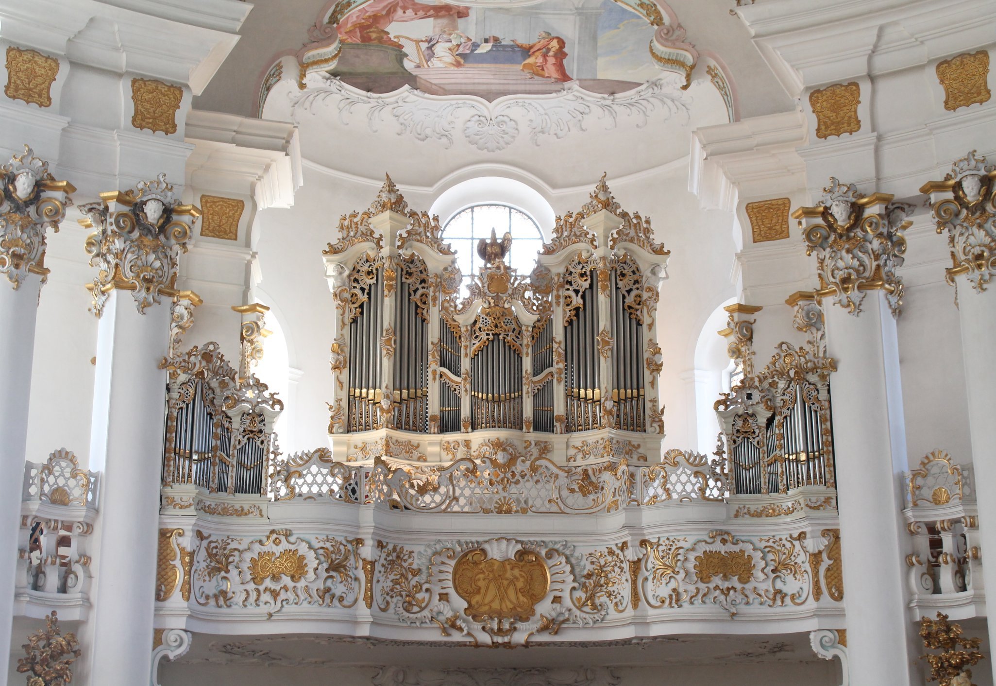 Orgel der Wieskirche (1757 J. G. Hörterich, 2010 C. Winterhalter, III/42)